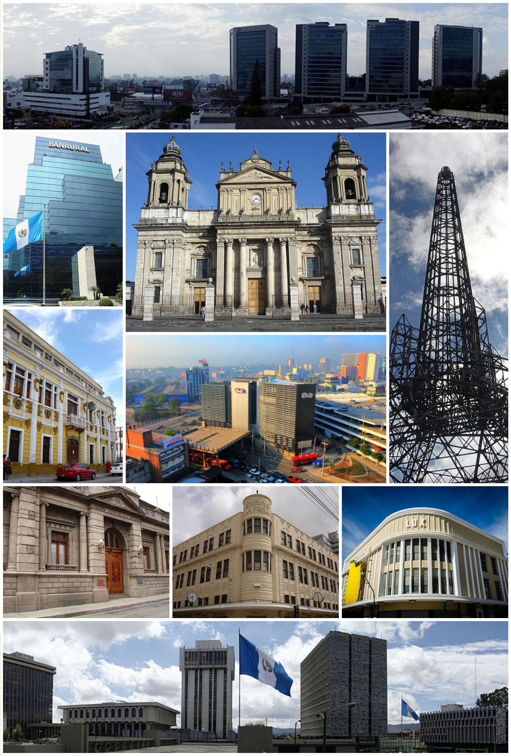 Ciudad de Guatemala